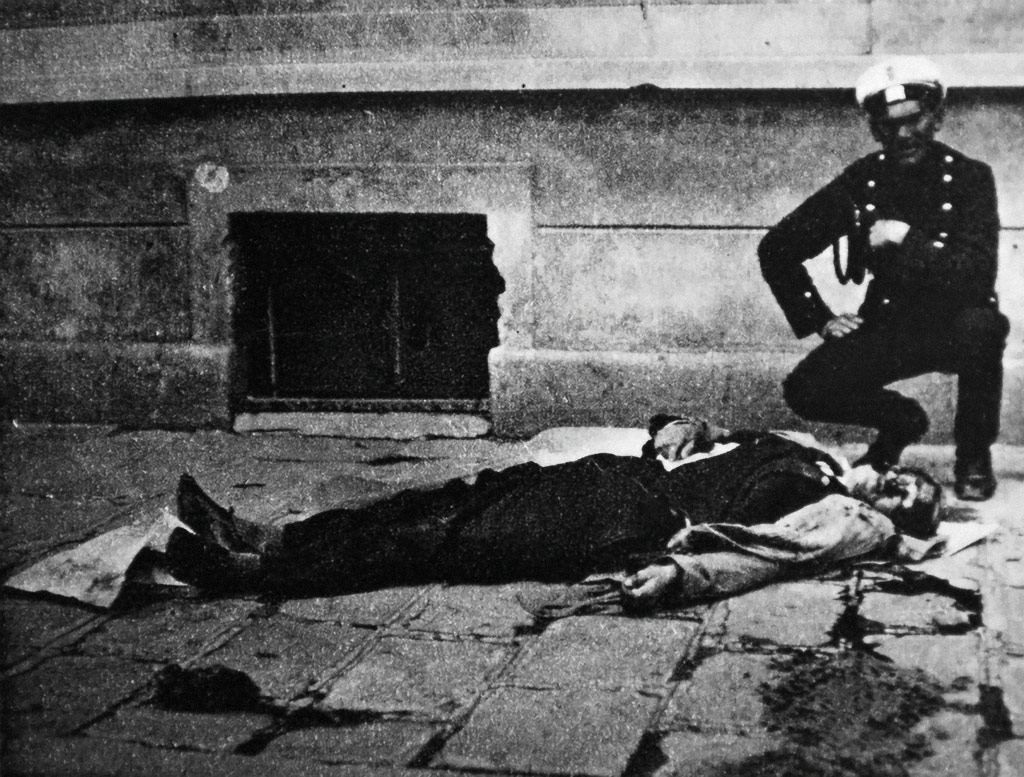 Полицай до трупа на Павел Попандов (Пано), член на ВМРО обединена, убит на улица "Цар Самуил" в София на 29 май 1933 г. с 8 куршума от ВМРО - михайловисти